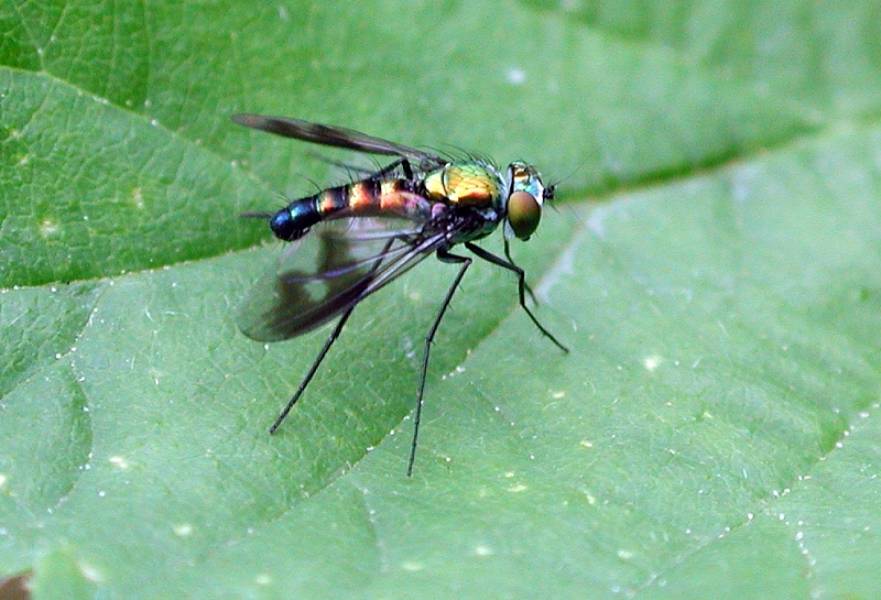 Langbeinfliege, Dolichopodidae, Wutachschlucht, Deutschland, Germany